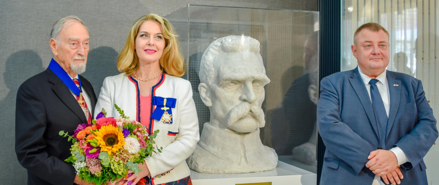 Mate Meštrović, Rumjana Meštrović odznaczeni Krzyżem Komandorskim Orderu Zasługi Rzeczpospolitej Polskiej